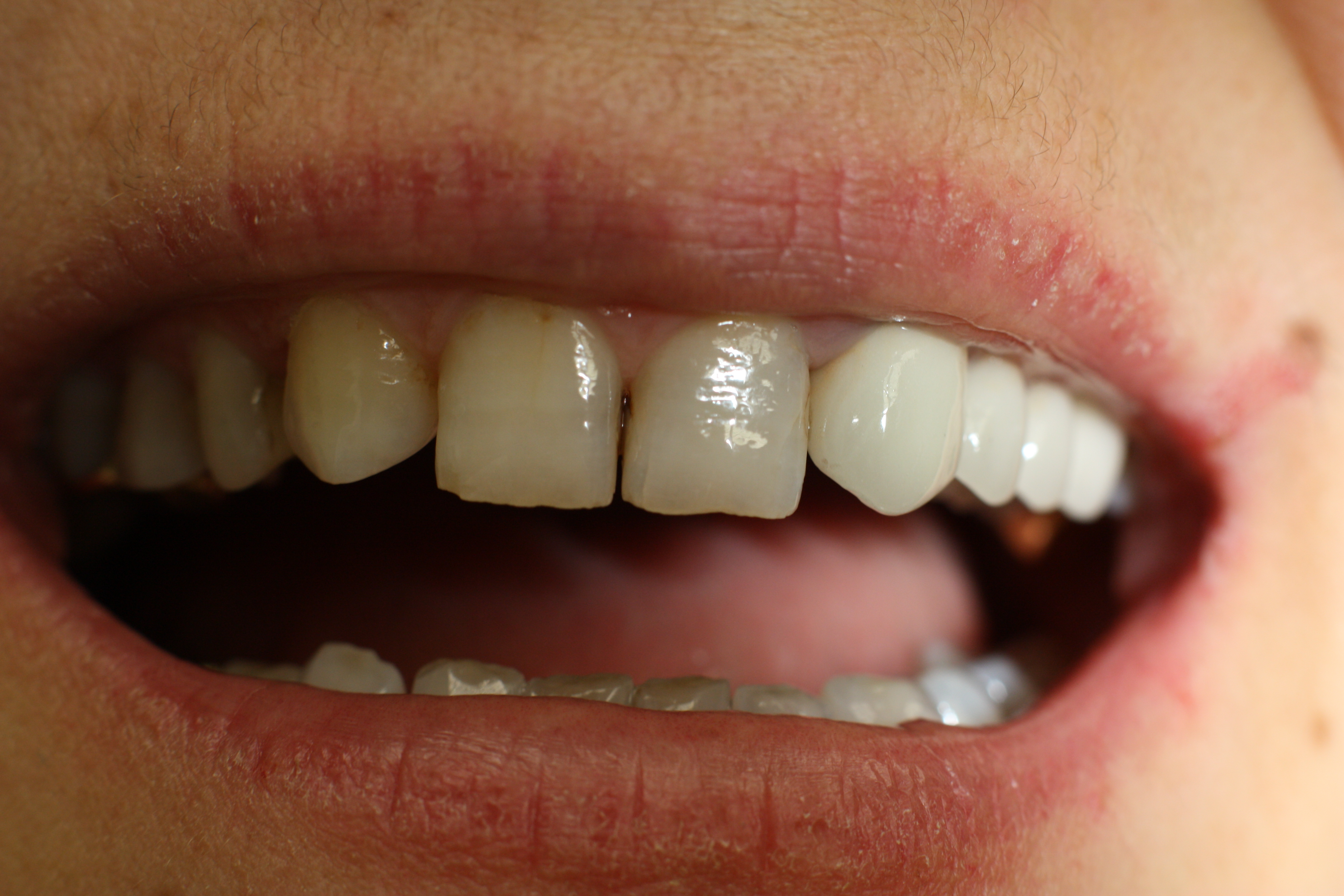 Nichtanlage der oberen Zweier